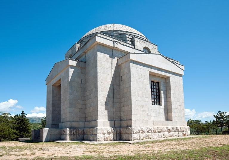 Ivan Meštrović Crkva Presvetog Otkupitelja, selo Ružić